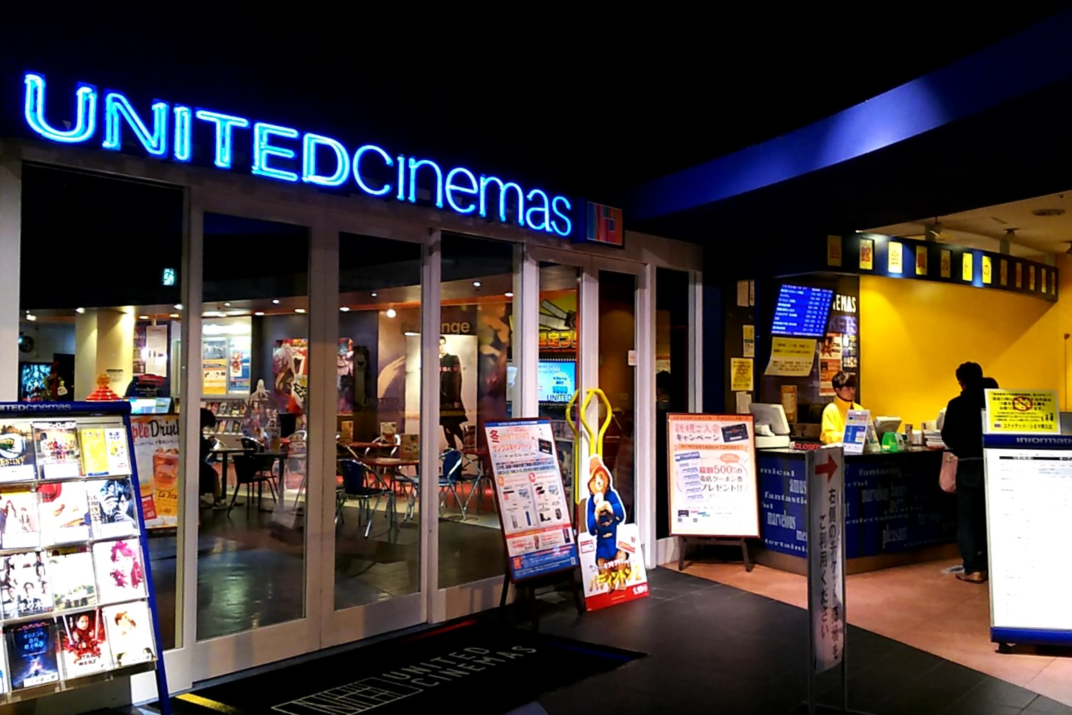 ユナイテッド・シネマ阿久比。